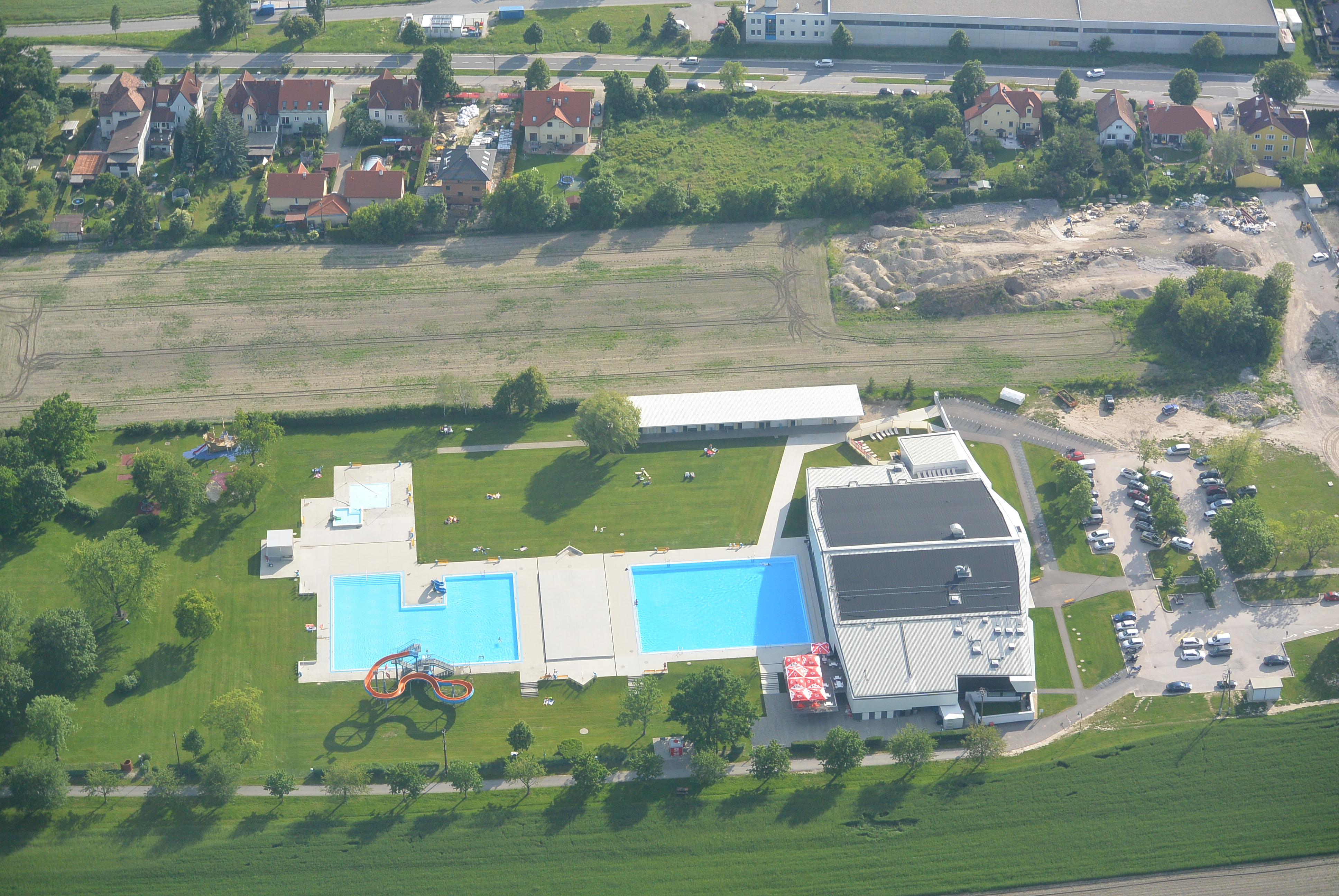 Luftfoto Korneuburg, 2014